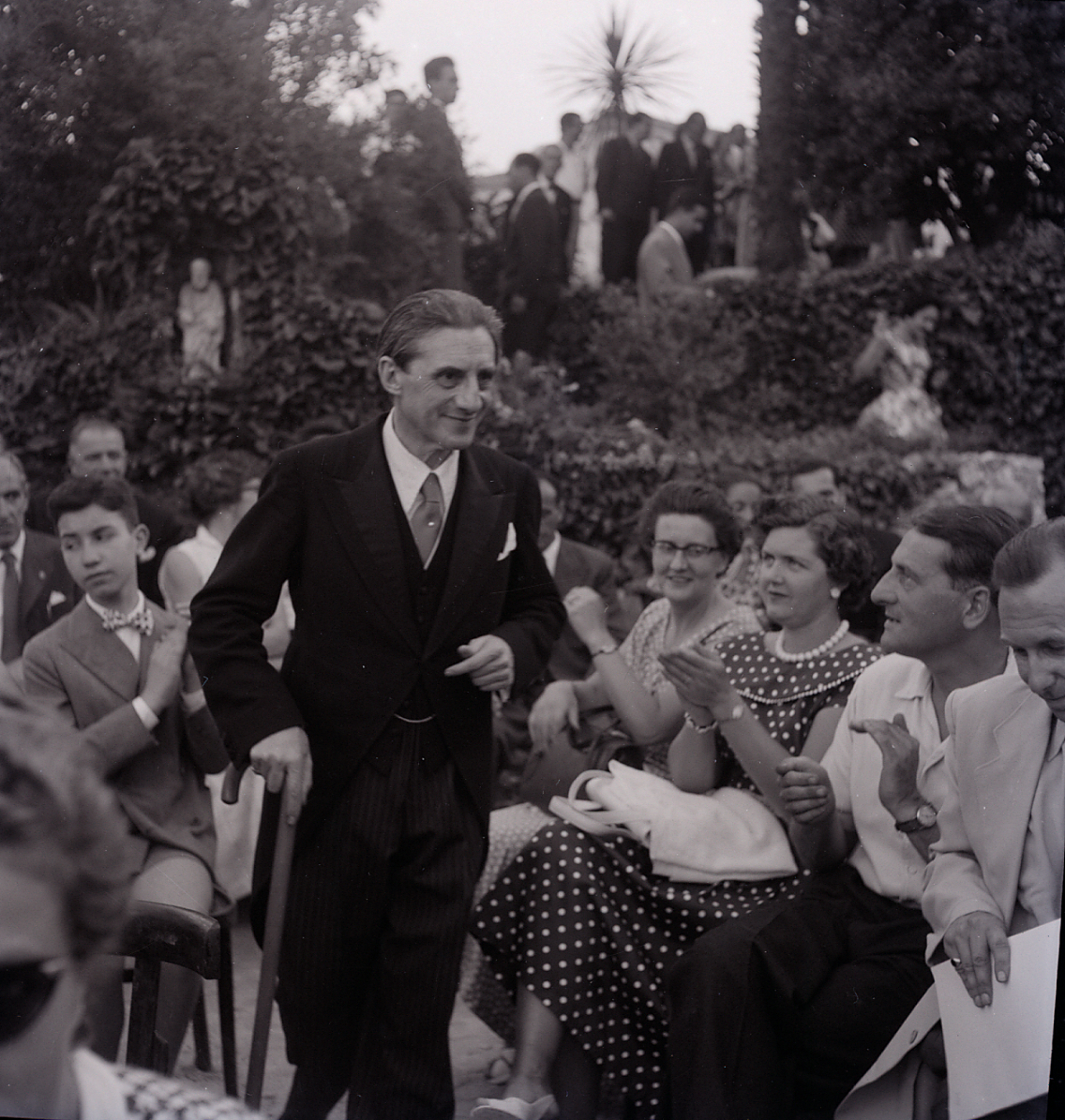 Ravello. Concerto diretto da John Barbirolli 1960. Servizio fotografico : Ravello, 1960 / Paolo Monti. - Buste: 8, Fototipi: 8 : Negativo b/n, gelatina bromuro d'argento/ pellicola ; 6x6. - ((Serie costituita da 8 negativi identificati con i nn.: 10436-10443. Sulla busta R10436 manoscritto: "Ravello Concerto Barbirolli". La suddetta serie è contenuta nella scatola identificata con la numerazione R10254/10443. Sul coperchio iscrizione manoscritta a pennarello: "Napoli"